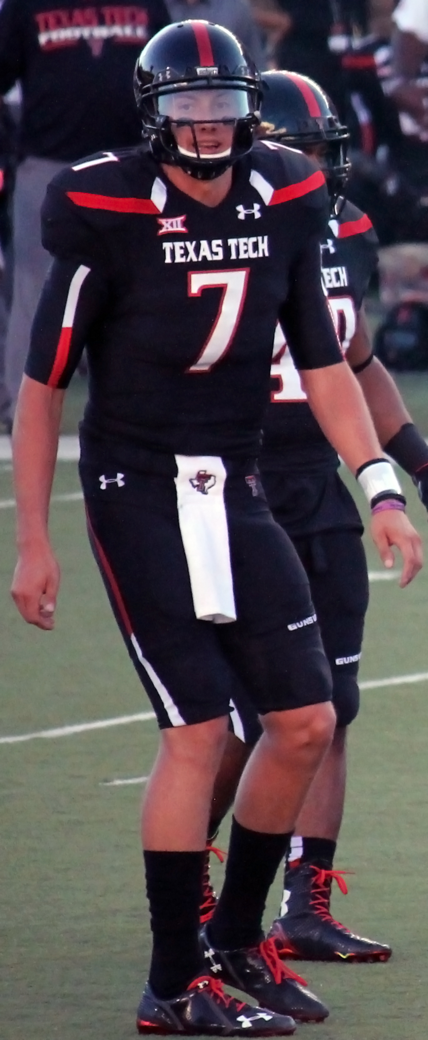 Davis Webb